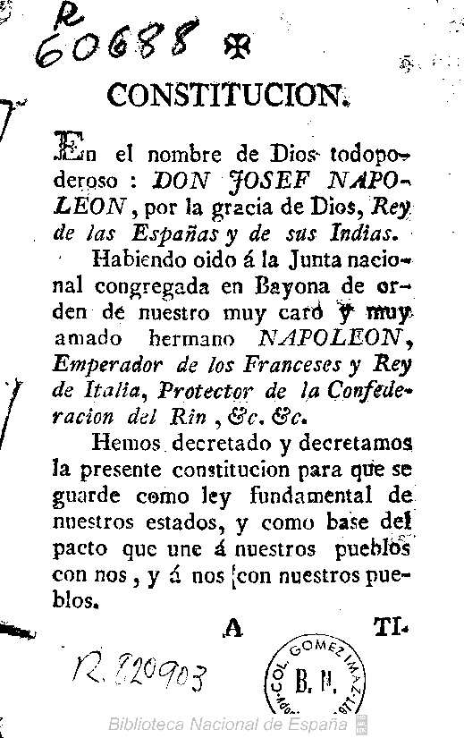 Constitucion : En el nombre de Dios todopoderoso, Don Josef Napoleon, por la gracia de Dios, Rey de las Españas y de sus Indias ...